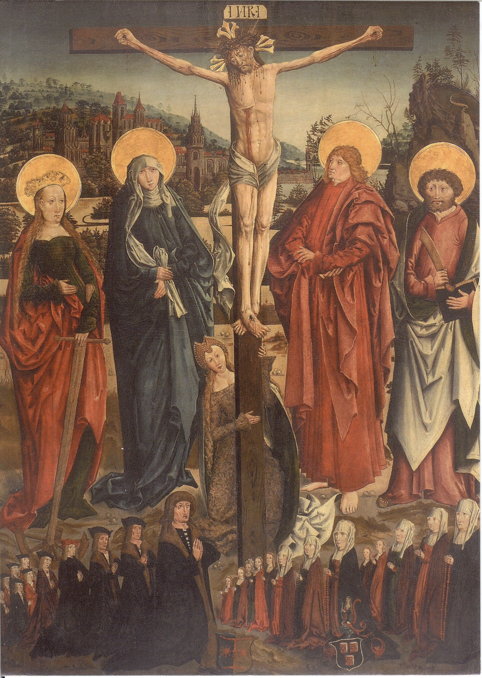 Peinture concernant la fmille von Blankenfeld de Thomas vers 1500